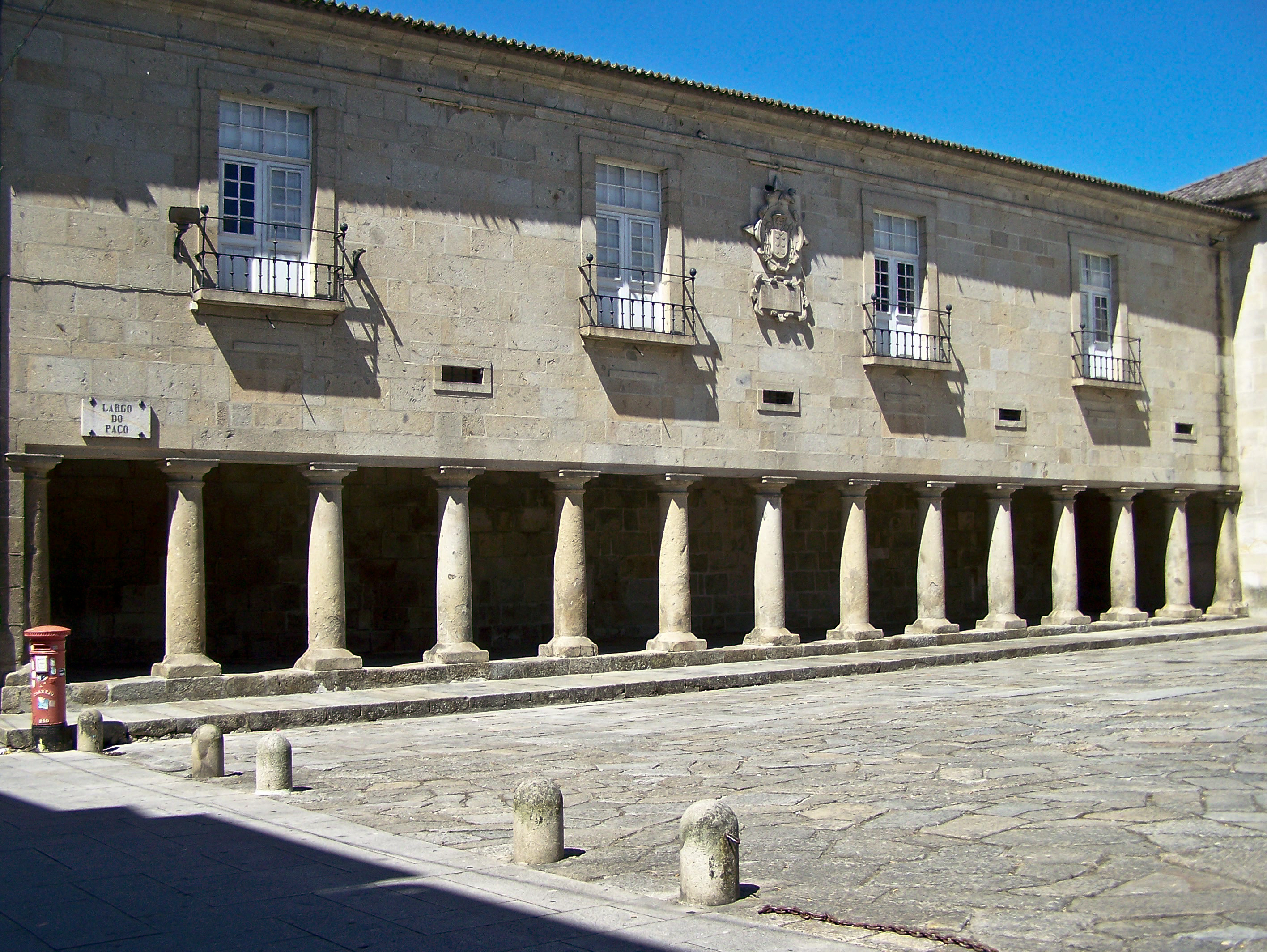 Um dos vários edifícios voltados para o Largo do Paço em Braga, Portugal